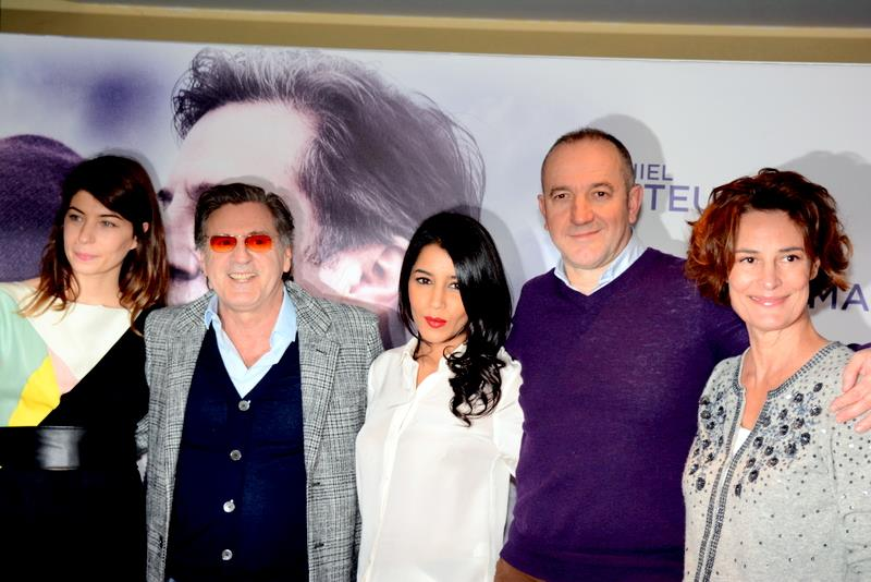 Avant-première du film "Avant l'hiver" : Anne Metzler, Daniel Auteuil, Leïla Bekhti, Philippe Claudel, Laure Killing.